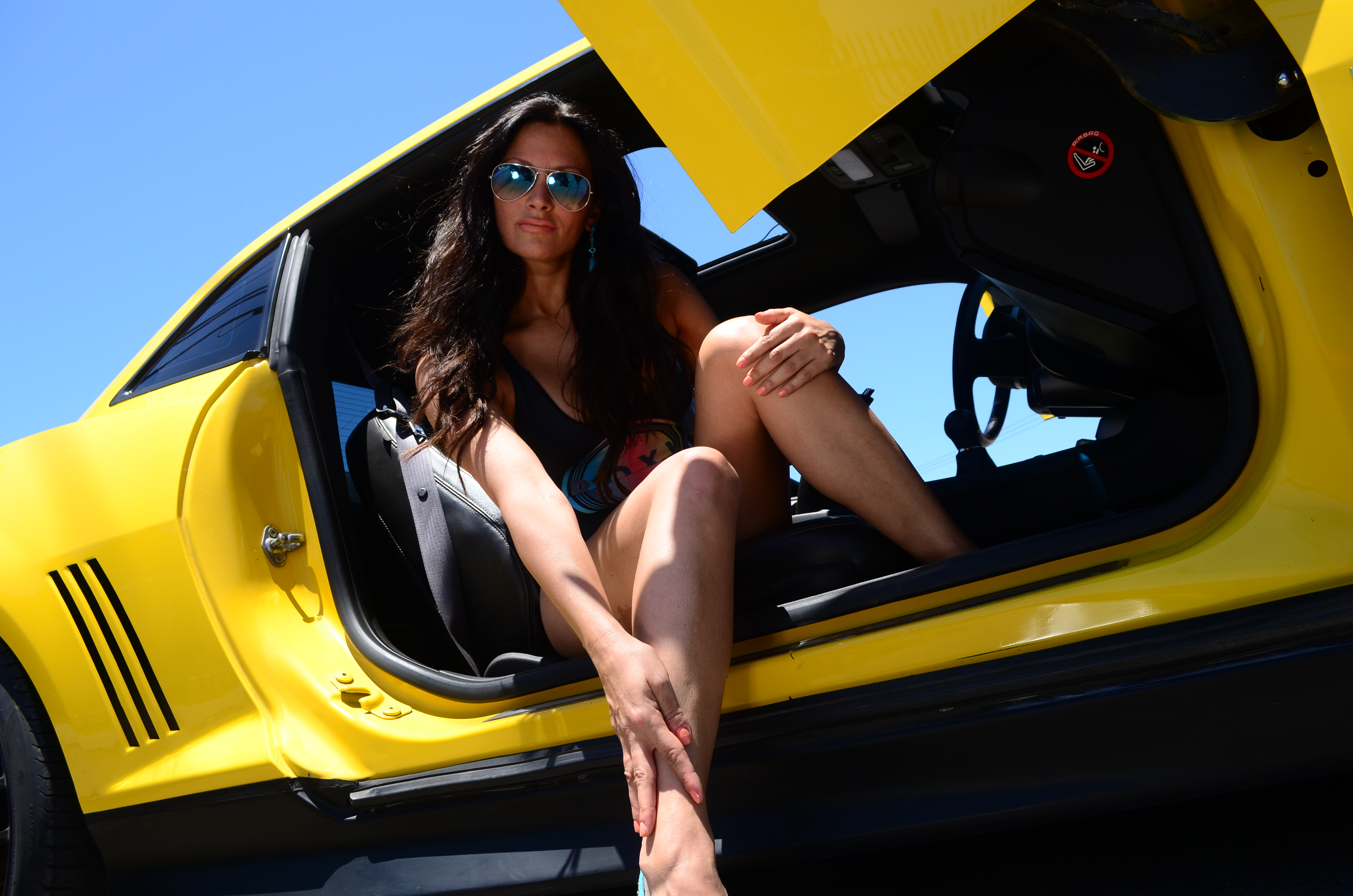 Sesión de fotos Nicole Andreu